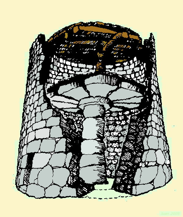 Bildbeschreibung: zeigt Talayot mit 2 Etagen im Schnitt Zeichner: Juan Costa Datum: April 2005